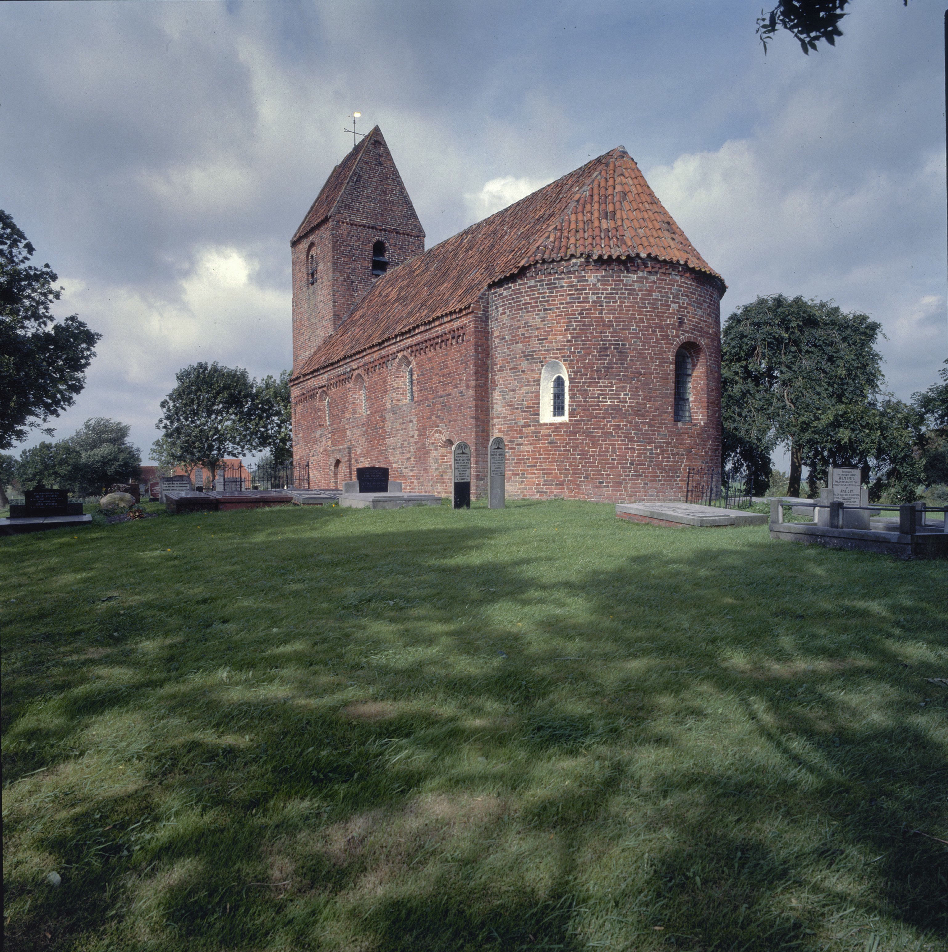 Nederlands Hervormde Kerk: Overzicht zuidoostgevel met kerktoren (opmerking: Gefotografeerd voor Monumenten In Nederland Groningen)